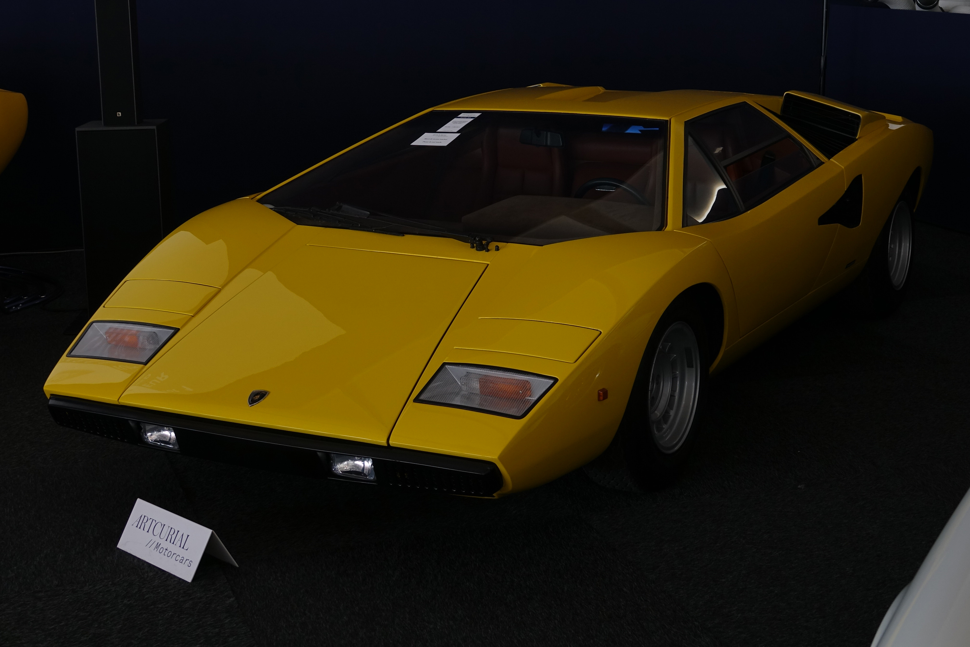 Lamborghini Countach - Vente Artcurial - Le Mans Classic 2018